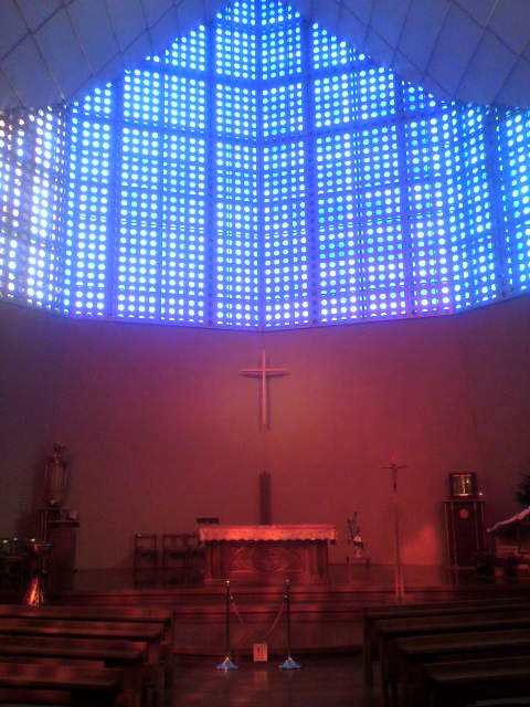 カトリック鹿児島司教座聖堂（ザビエル教会）祭壇